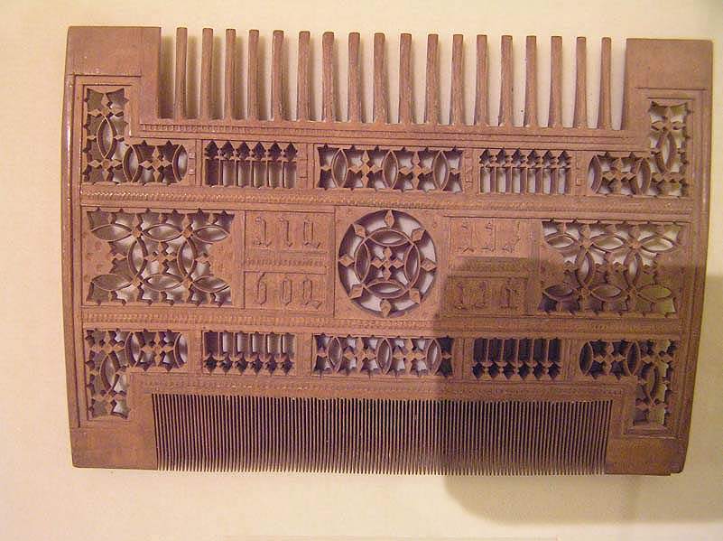 Bijoux du moyen age, peigne, hôtel de Cluny Paris musée national du Moyen age